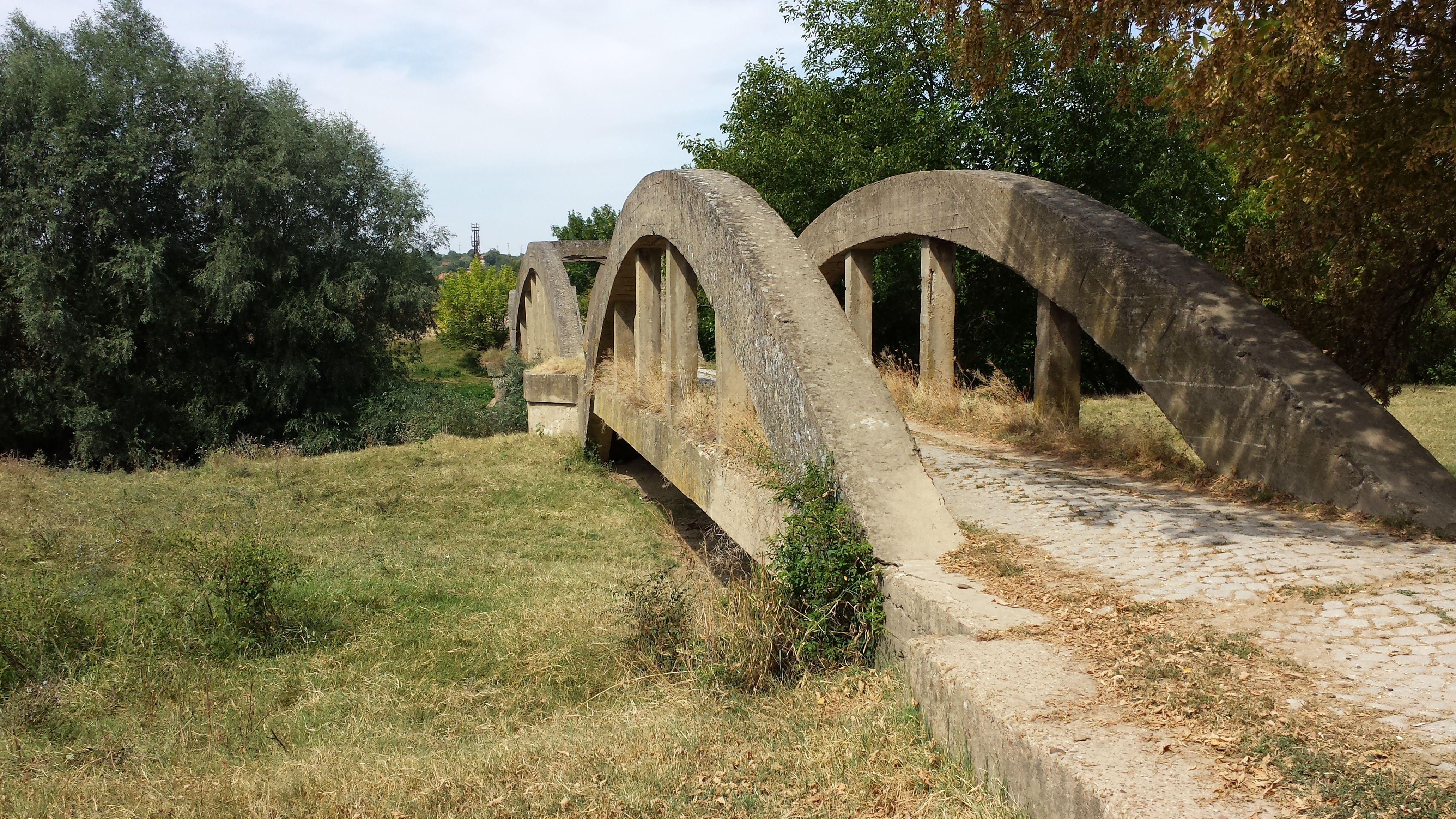 Железобетонният мост в с.Комарево, обл.Плевенска, построен през 1916-1917г.